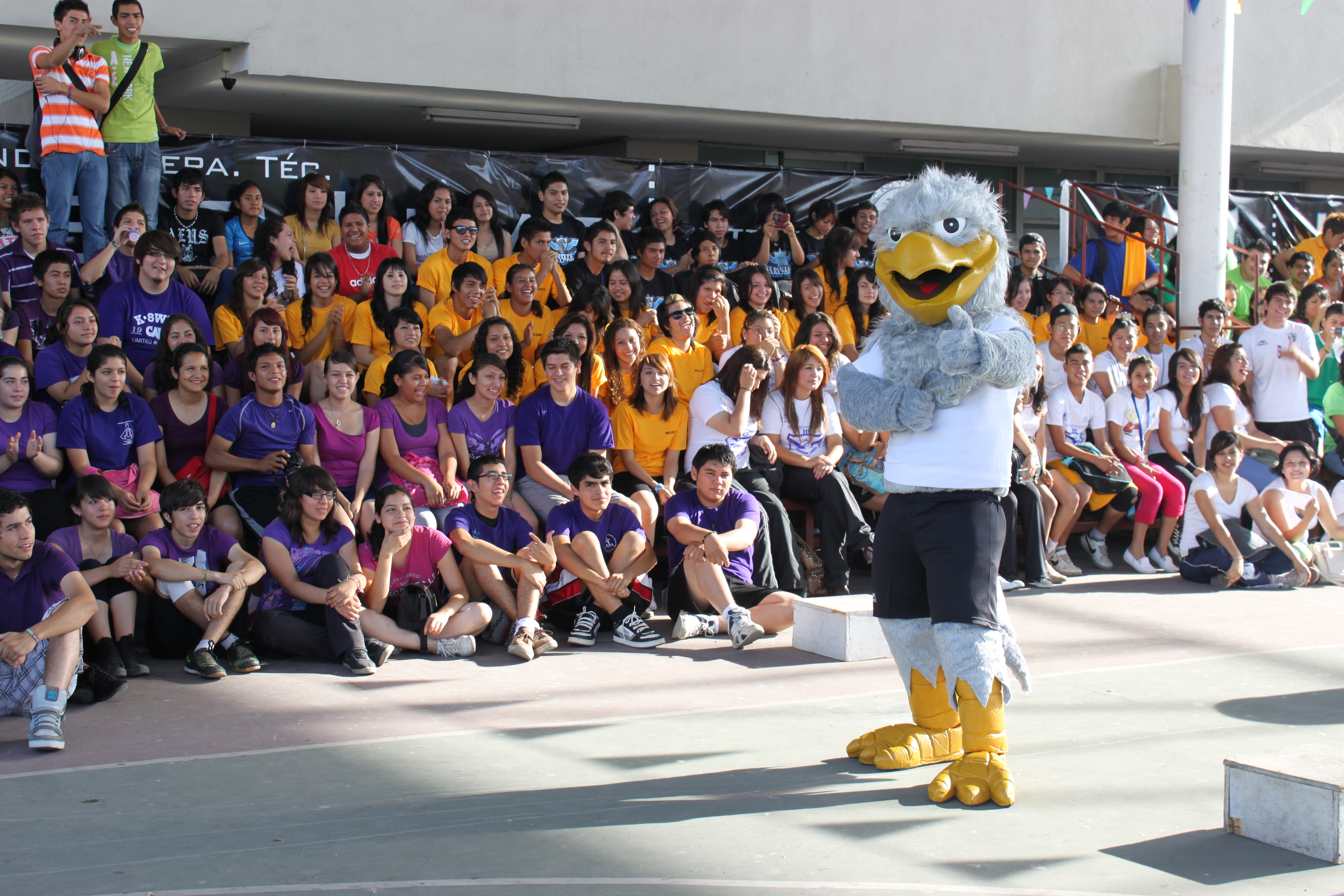 halcón pablo livas en el rally 2011